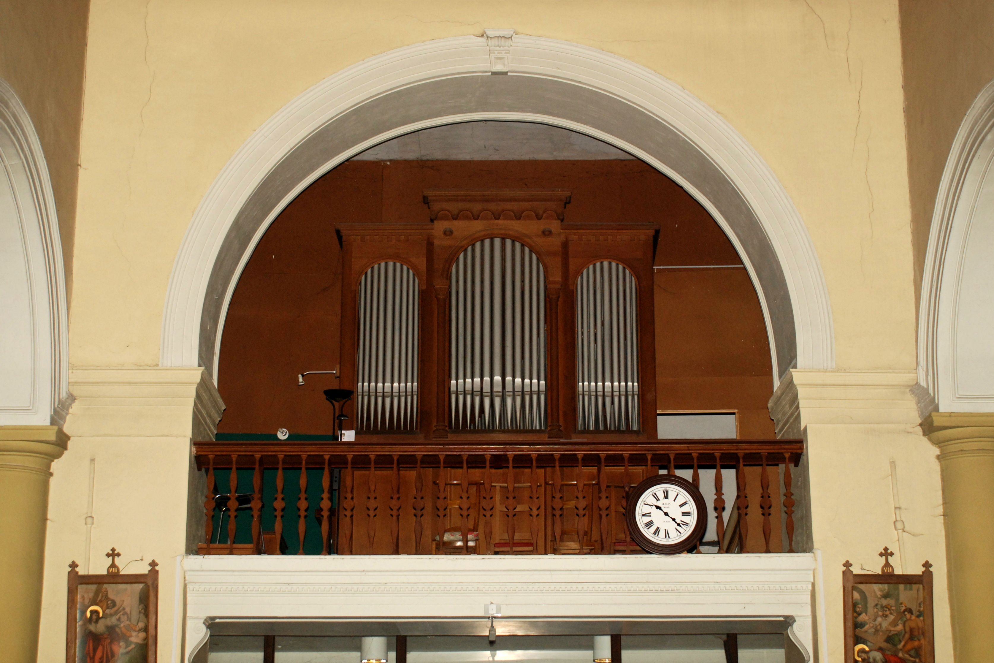 Belgique - Brabant wallon - Église Saint-Martin de Ways